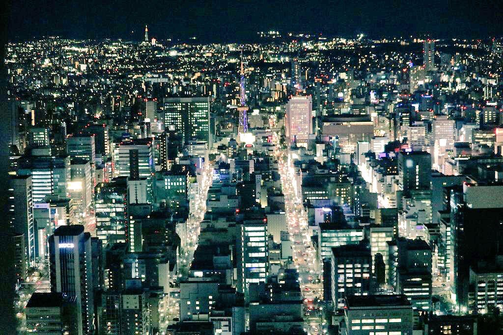 Downtown of Nagoya